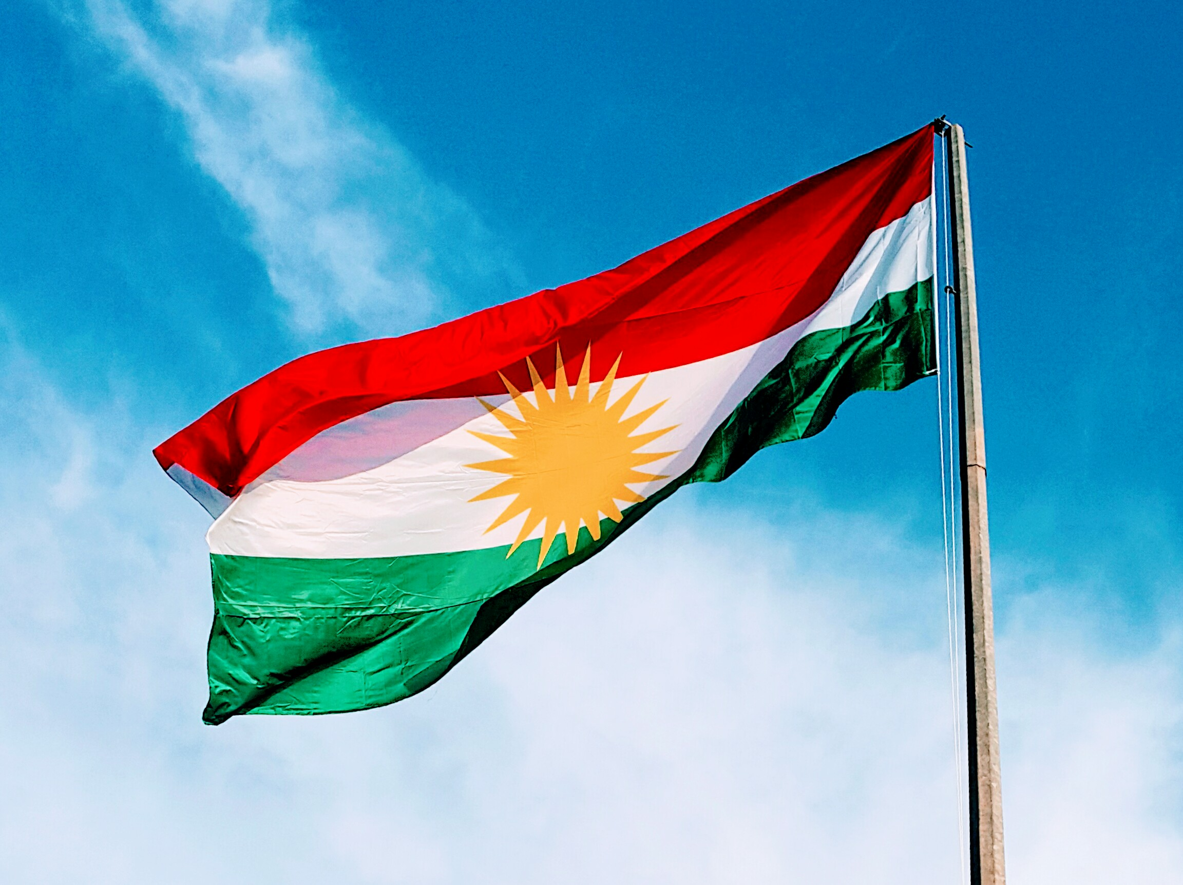 Flag of Kurdistan (Kurdish Flag)